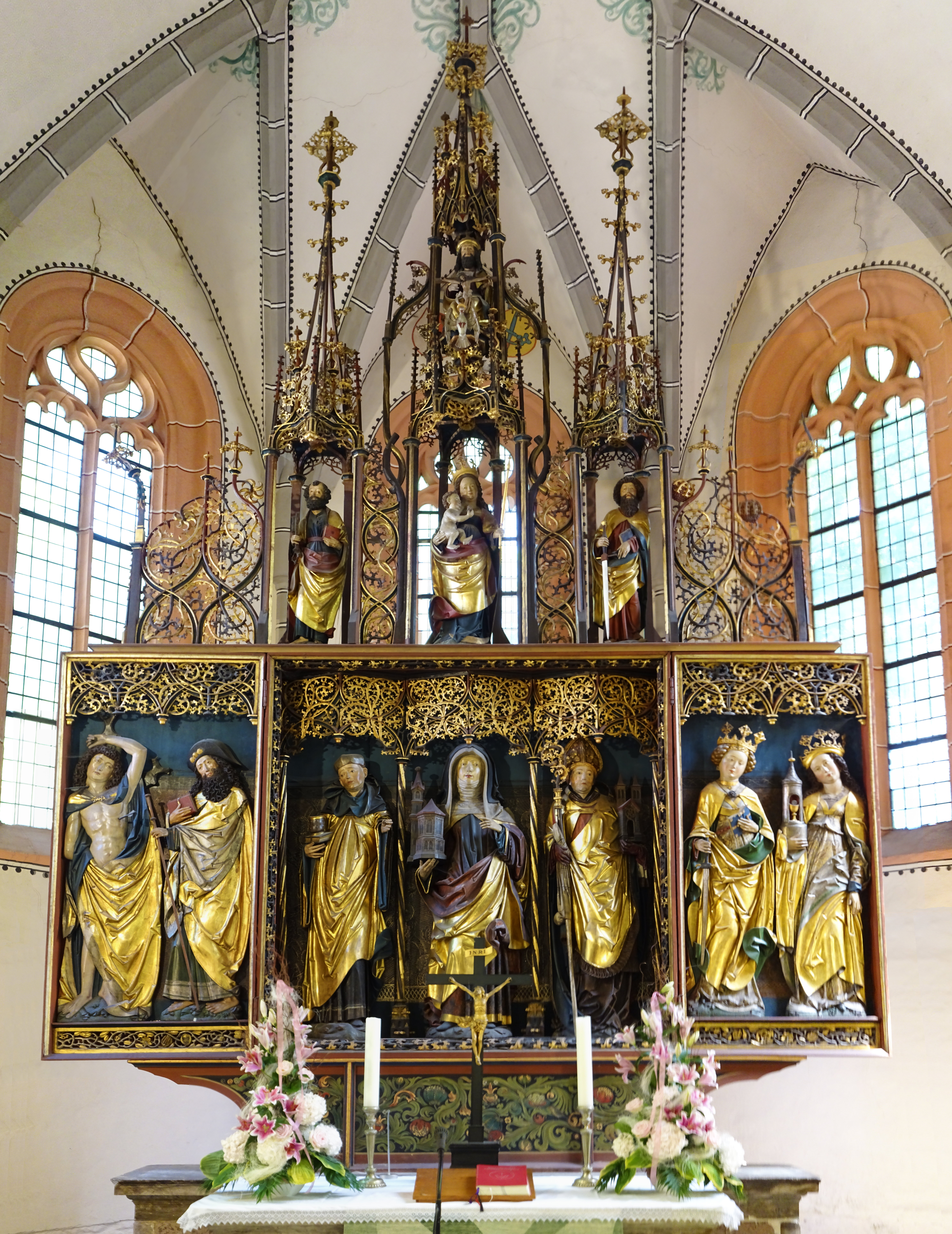 Gertrudiskirche (Saalfeld-Graba), 7 m hoher spätgotischer Schnitzaltar aus Saalfelder Schule. Die Figuren wurden etwa 1510 von Hans Gottwald von Lohr angefertigt. Im Mittelteil befinden sich die lebensgroßen Figuren der heiligen Gertrud zwischen Benedikt von Nursia und Anno von Köln. In den geöffneten Flügeln stehen die in Flachreliefs ausgeführten Heiligen Sebastian und Jakobus der Ältere sowie Katharina und Barbara. Der filigran geschnitzte Auszug über dem Schrein wird geschmückt von den Figuren der Maria mit Kind zwischen Petrus und Paulus; im obersten Teil erscheint die Figurengruppe des Gnadenstuhls oder der Heiligen Dreifaltigkeit.[1]